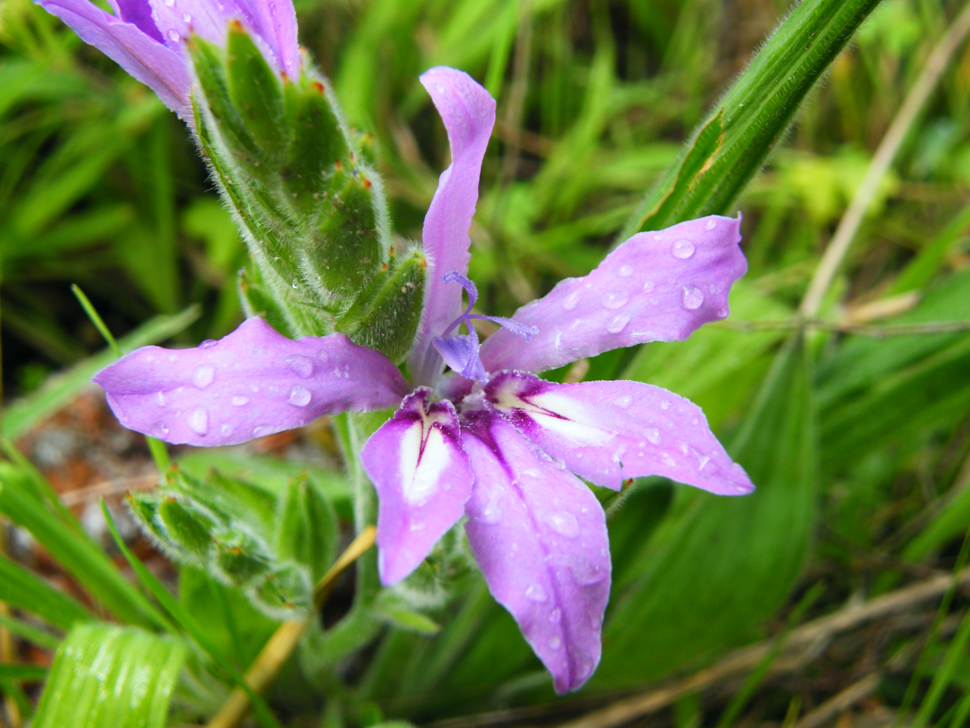 Bobbejaantjie, Common babiana